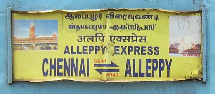 Alleppy express cropped